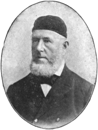 Hornjoserbsce: Jan Bohumił Nyčka (1825–1904); serbski wučer a spisowaćel.